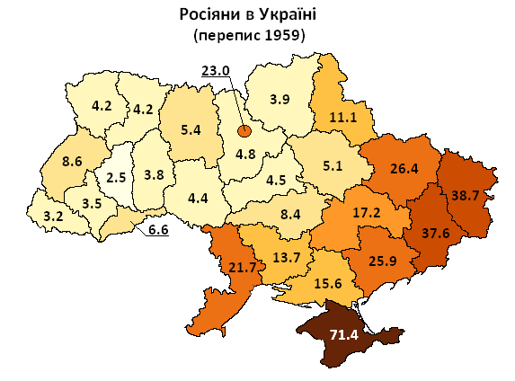 Розселення росіян в Україні за переписом 1959 р. / Russians in Ukraine, 1959 census